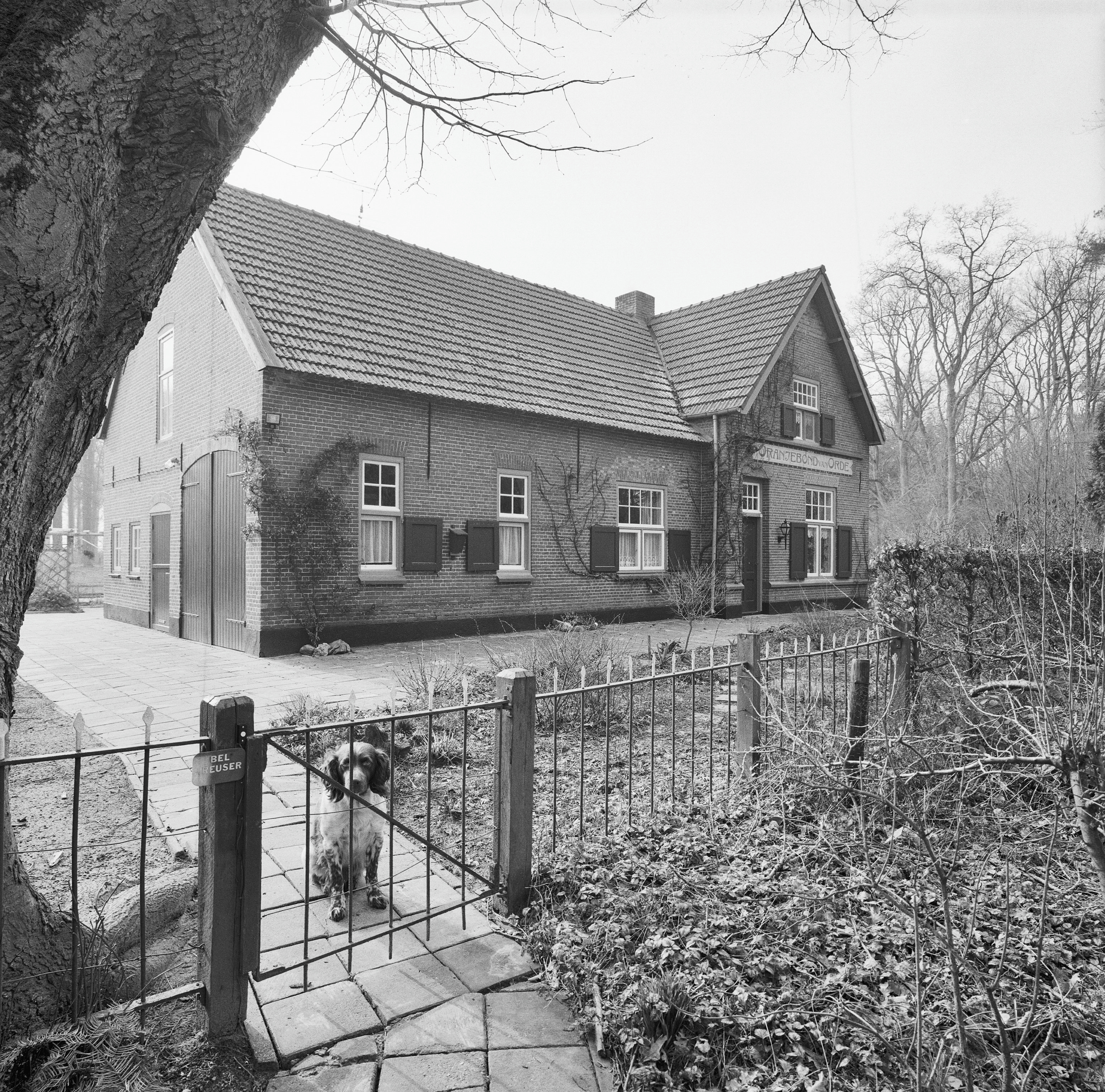 Boerderij Oranjebond Van Orde: Exterieur VOORGEVEL, LINKER ZIJGEVEL